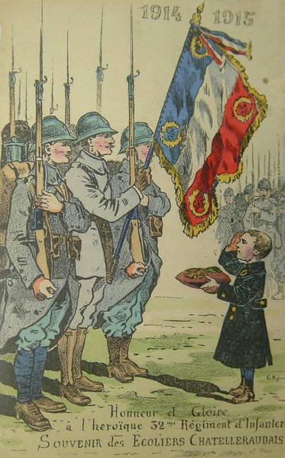 Carte postale illustrant la gratitude des écoliers de Châtellerault à l'égard du 32° RI pour sa bravoure lors de la grande guerre lui ayant valu les couleurs de la croix de guerre - Document personnel